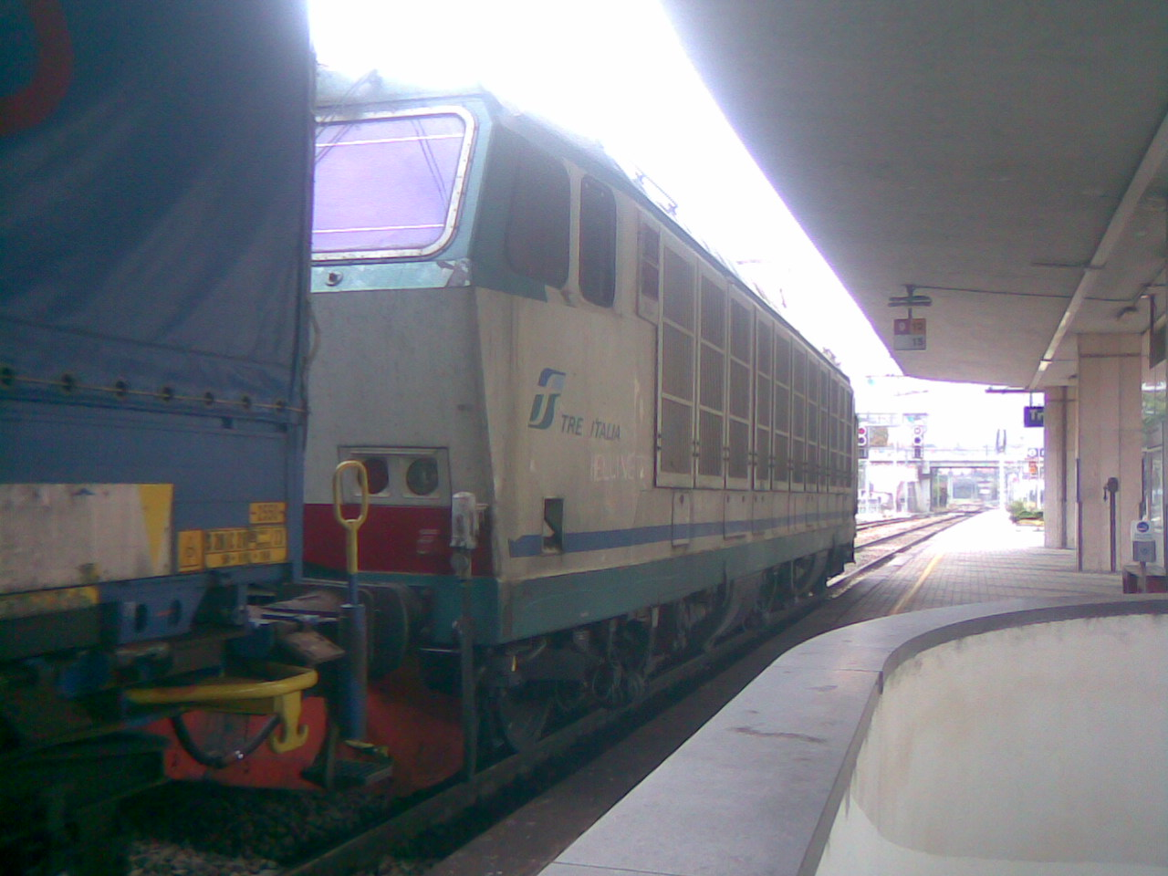 Locomotiva E.652 vista di lato dal retro in transito presso la stazione di Trento